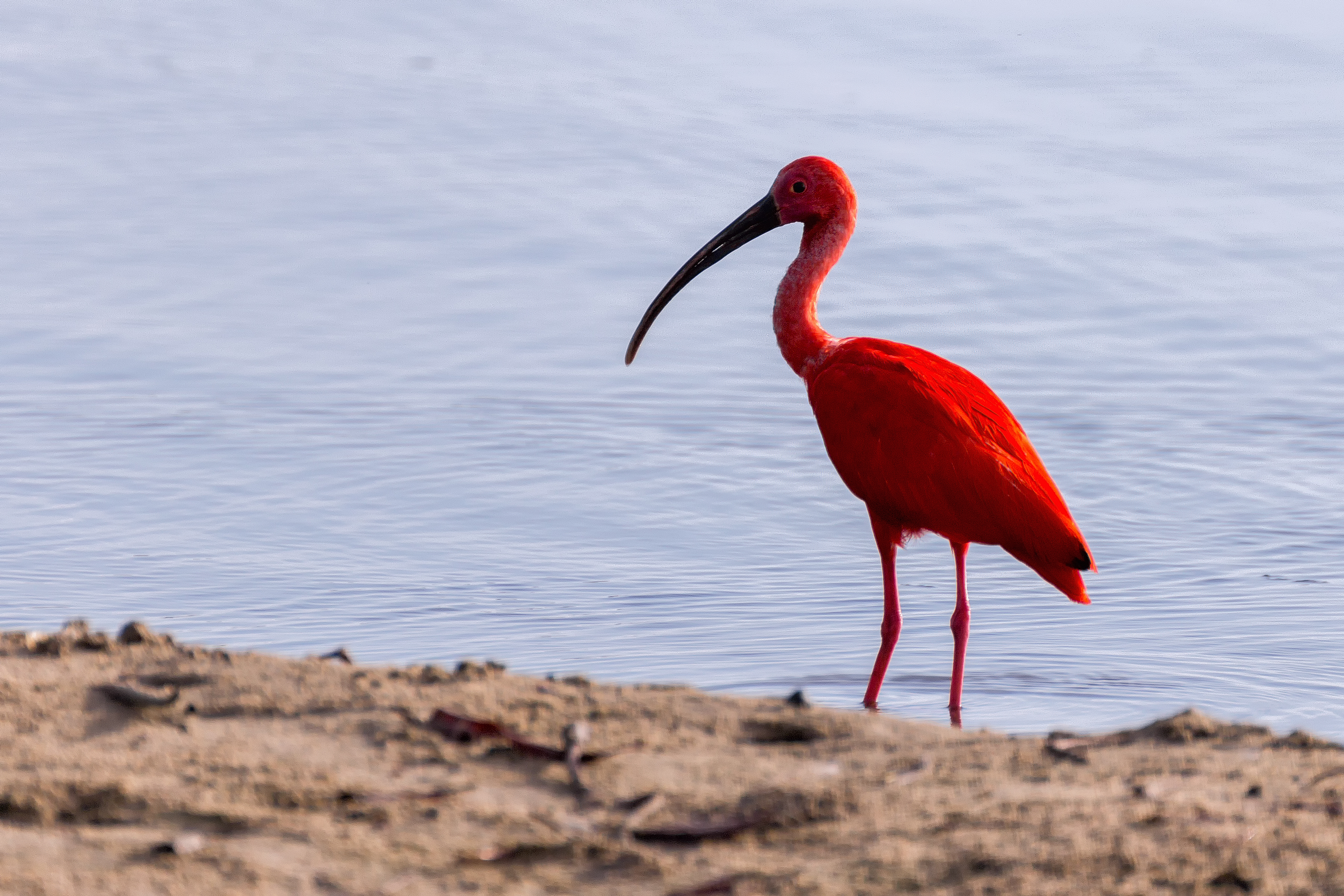 Scarlet Ibis | Corocoro Colorado (Eudocimus ruber)